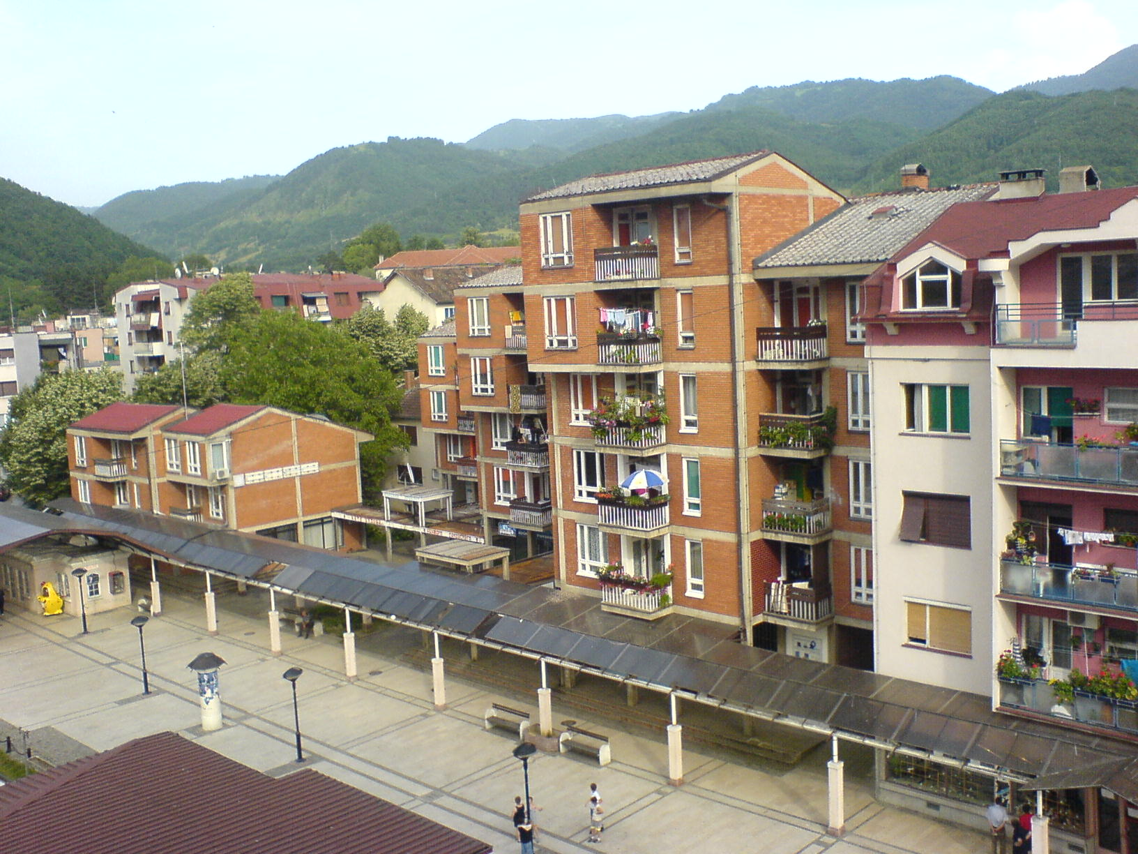 Surdulica, Serbia